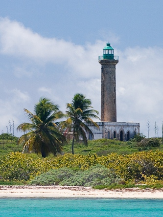 Le phare de Petite Terre